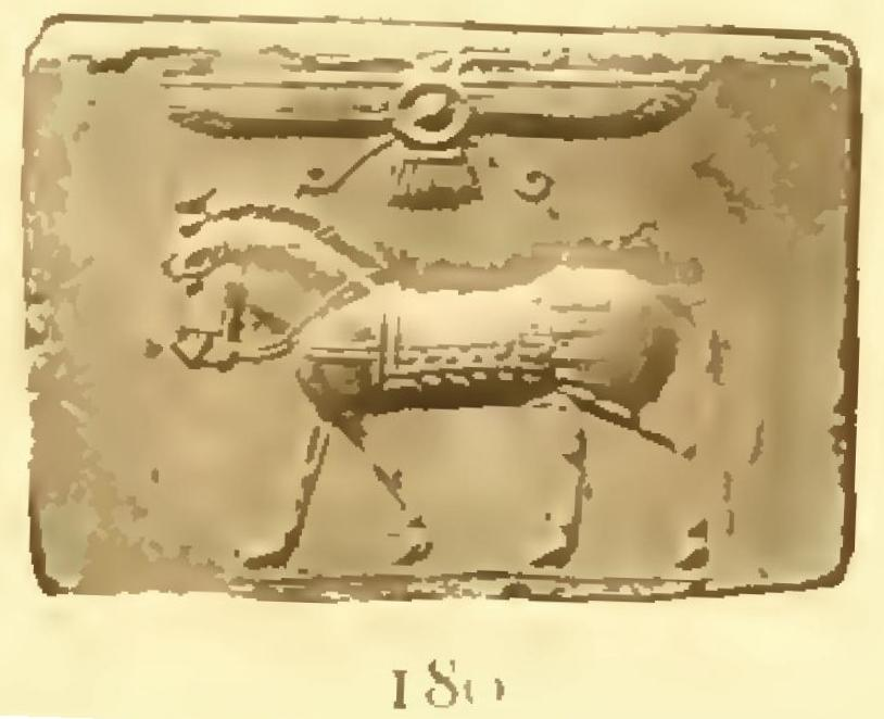 Schmuckstein